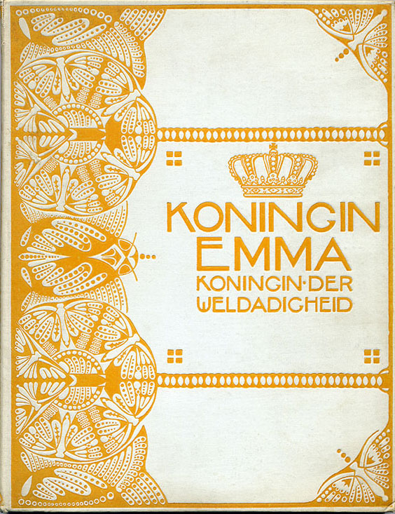 gescande boekband ontworpen door T.J.J. Neuhuys (1878-1921)